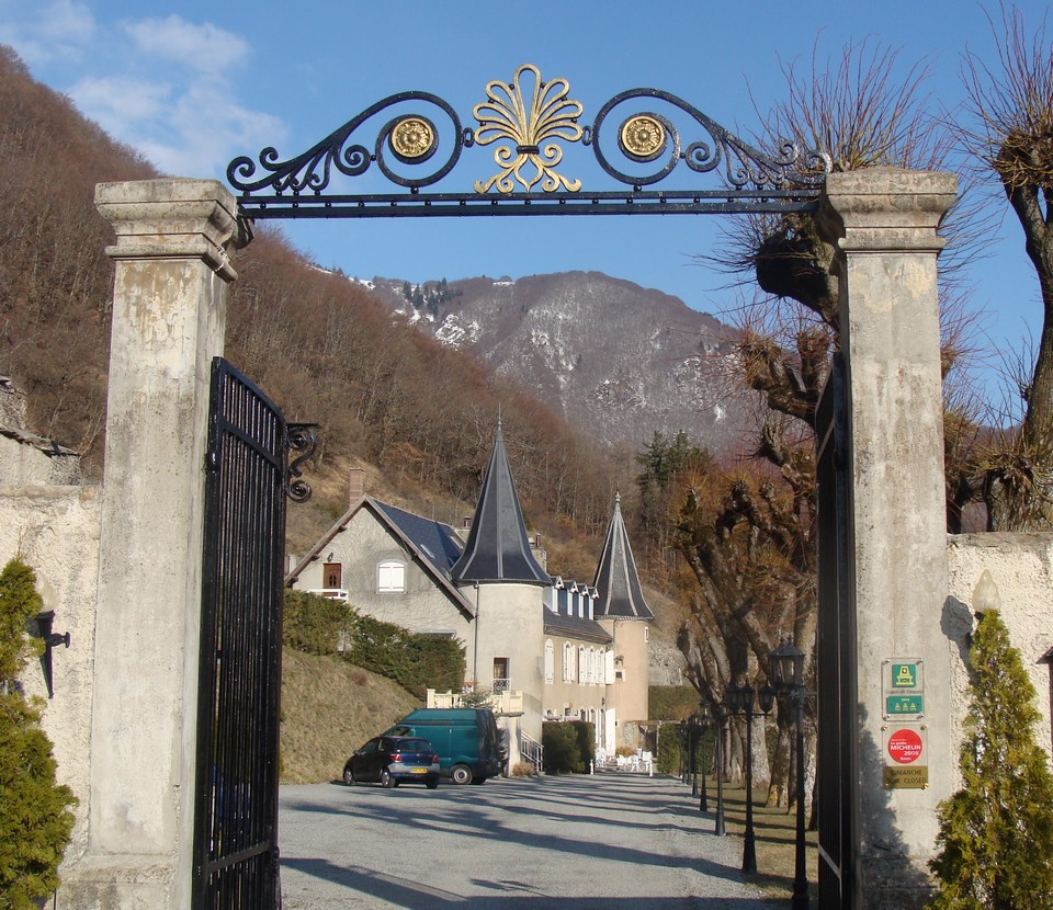 La grille d'entrée de la propriété du château d'Aspres-lès-Corps.